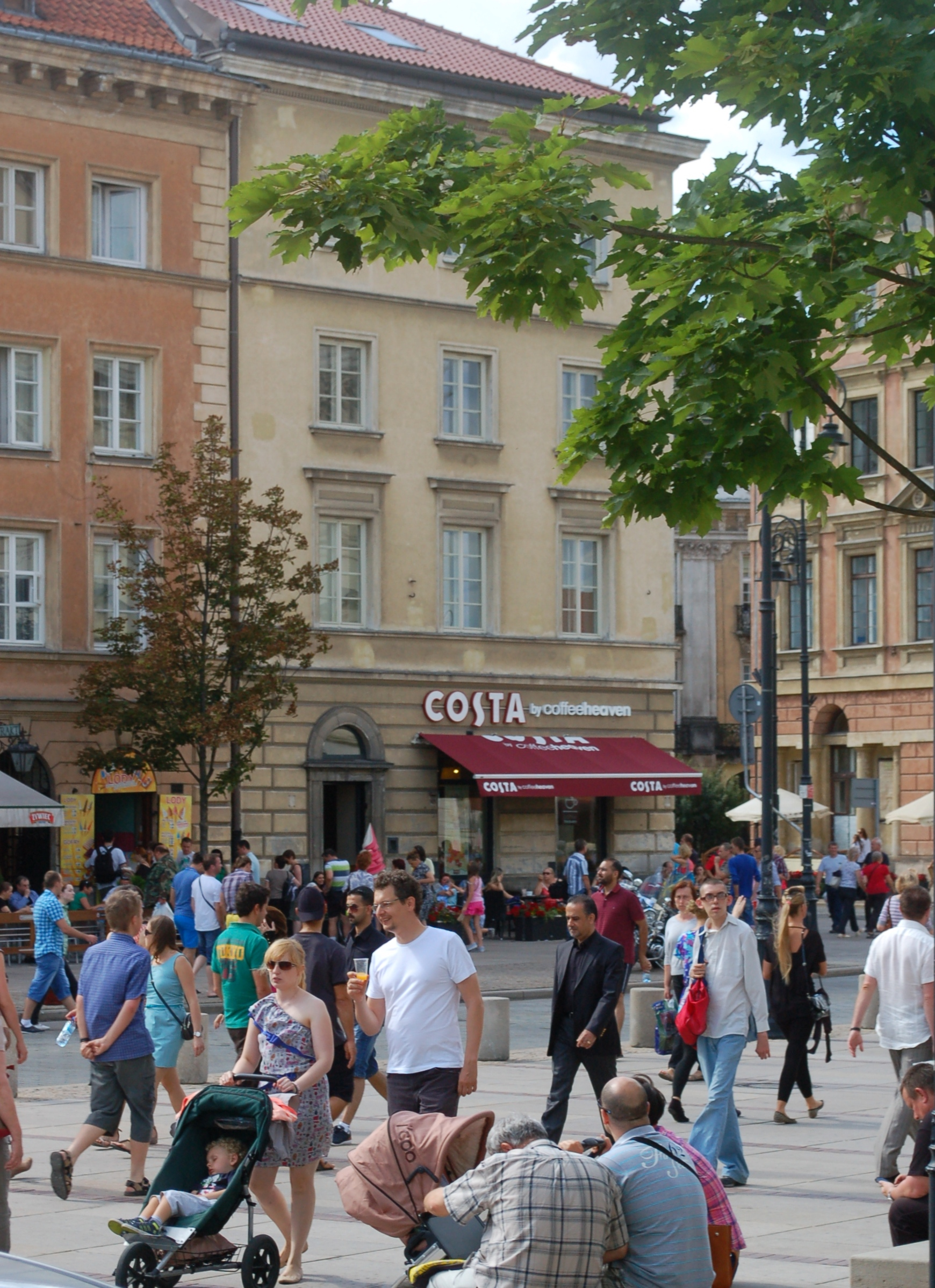 Warschau